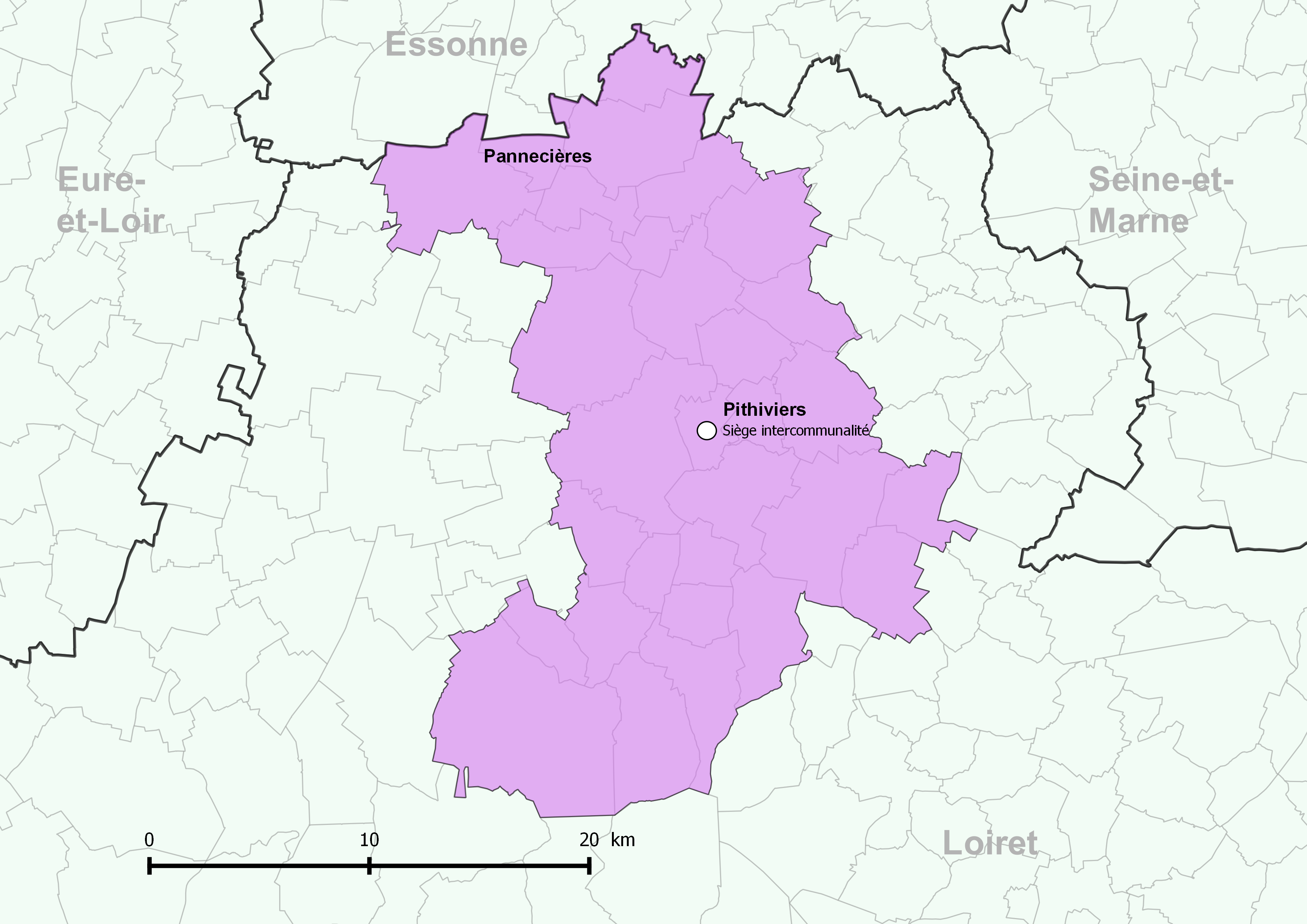 Périmètre de la communauté de communes du Pithiverais - Positionnement de la commune de Pannecières.